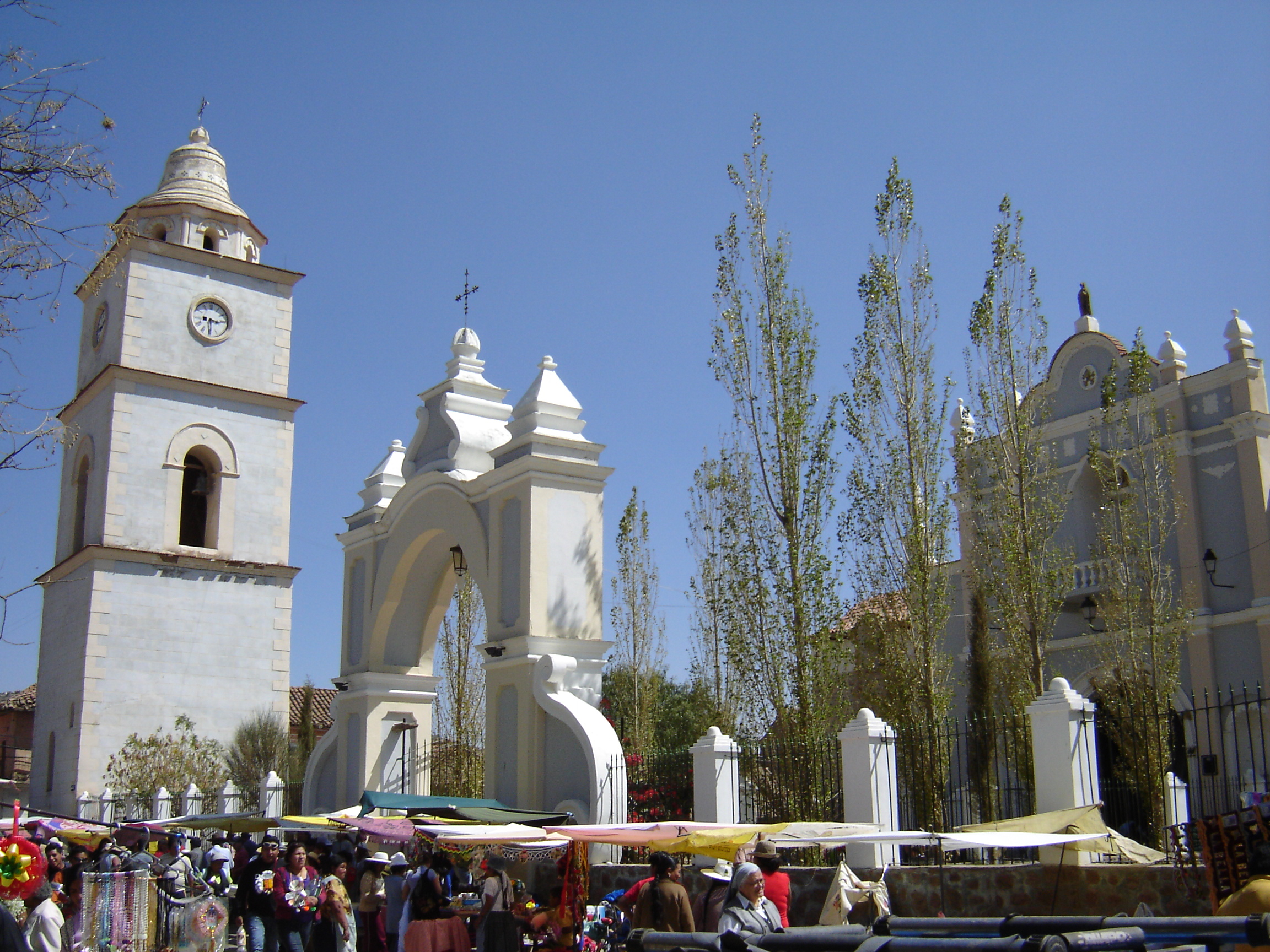 Runa Simi: K'acha llump'aq Mariyaq wak'an Jarani llaqtapi, Wuliwya suyupi.